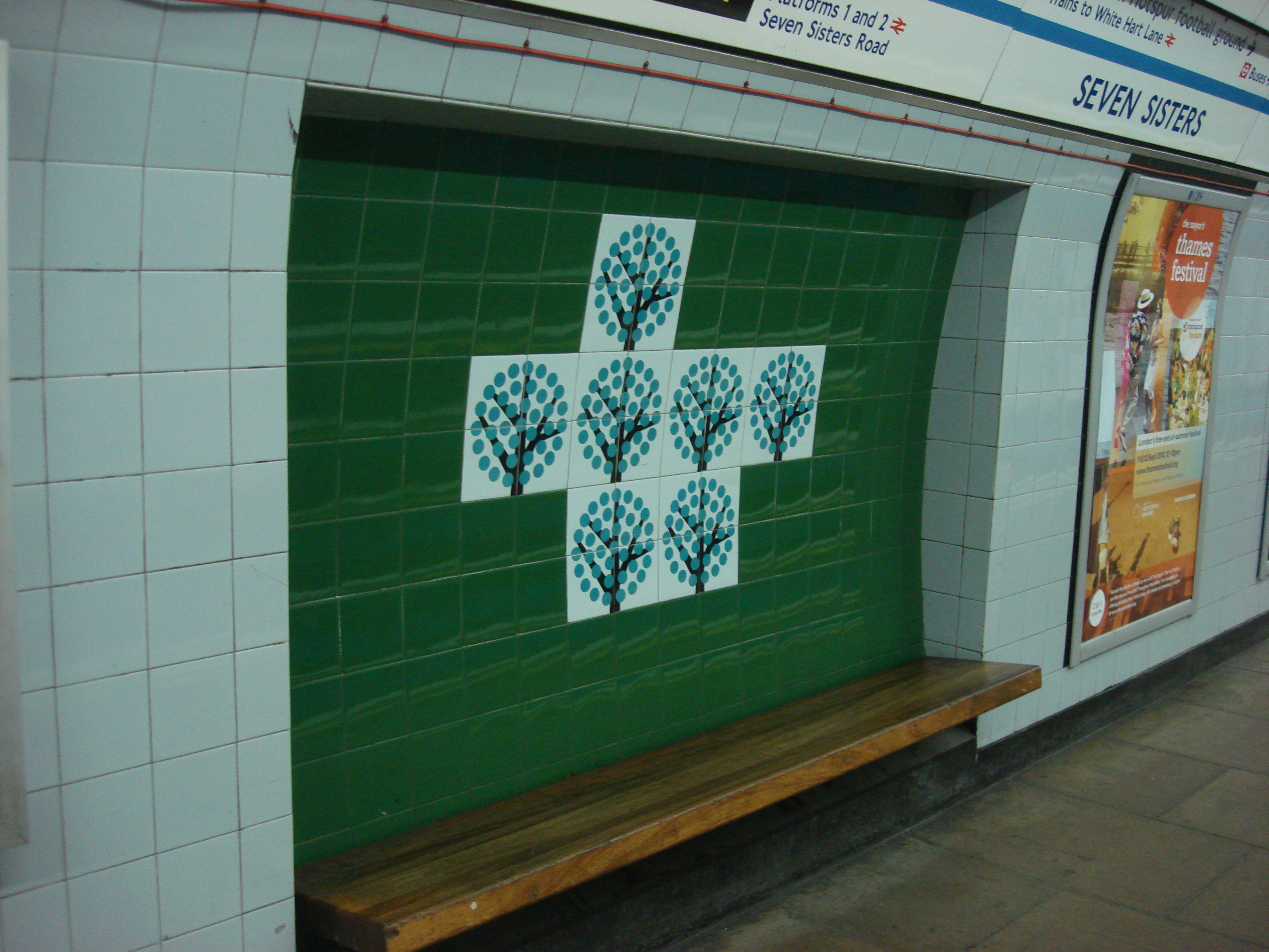 Seven trees tile motif at Seven Sisters station, by Hans Unger.